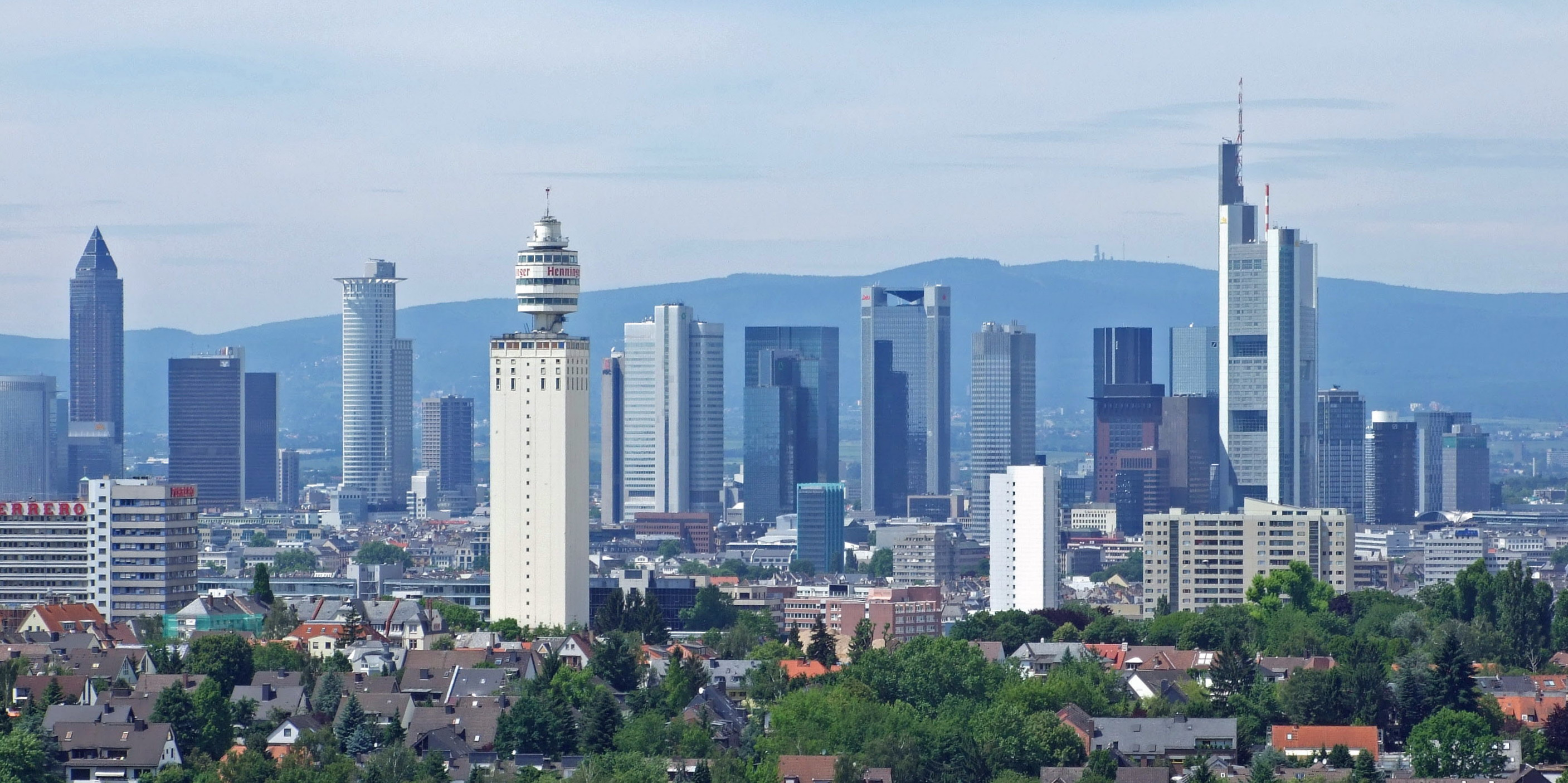 skyline von Frankfurt aus Sueden